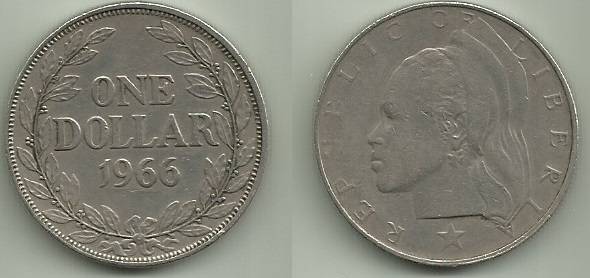 Moneda de 1 Dólar, Liberia